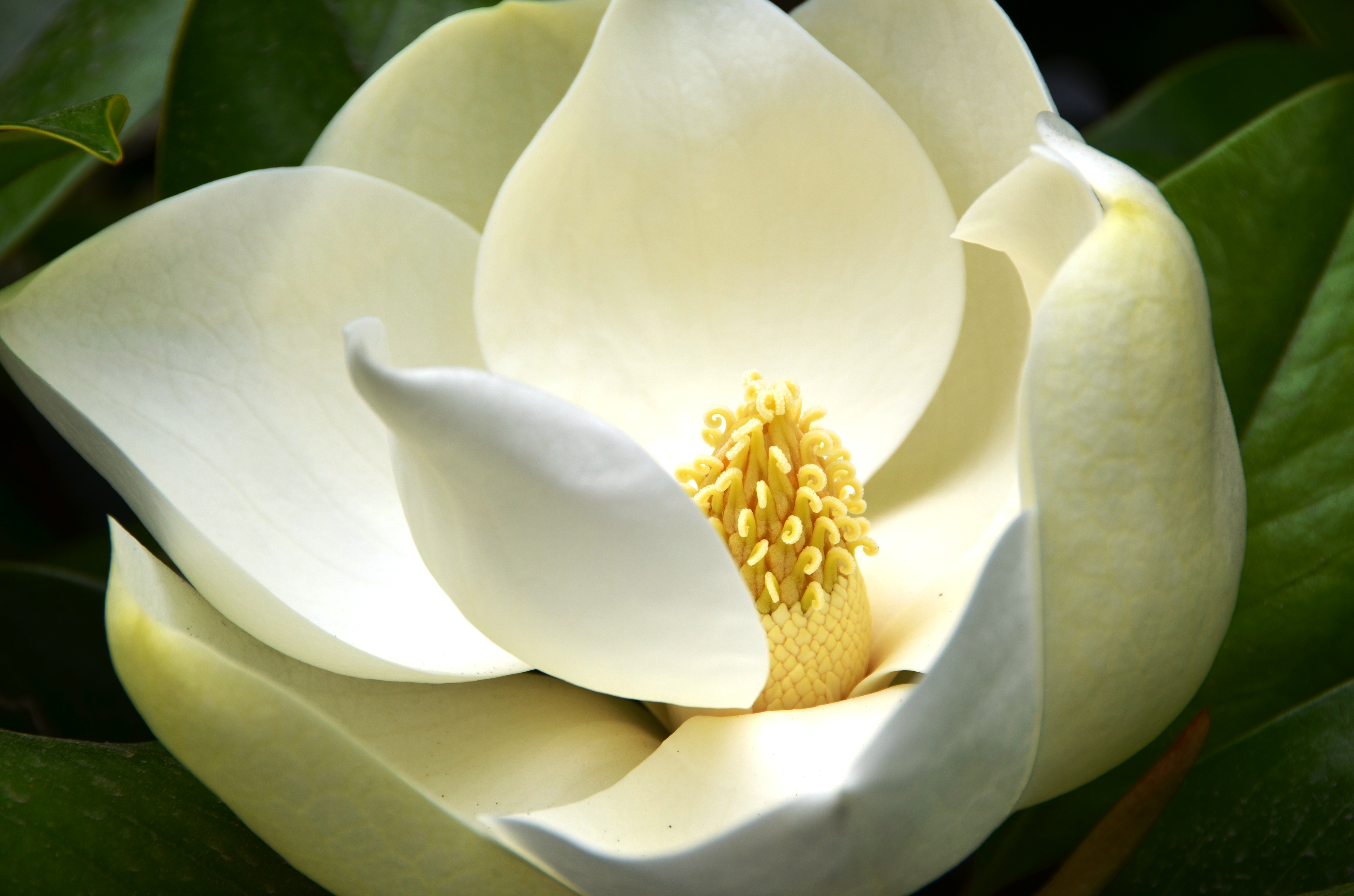 Magnòlia a Verbania